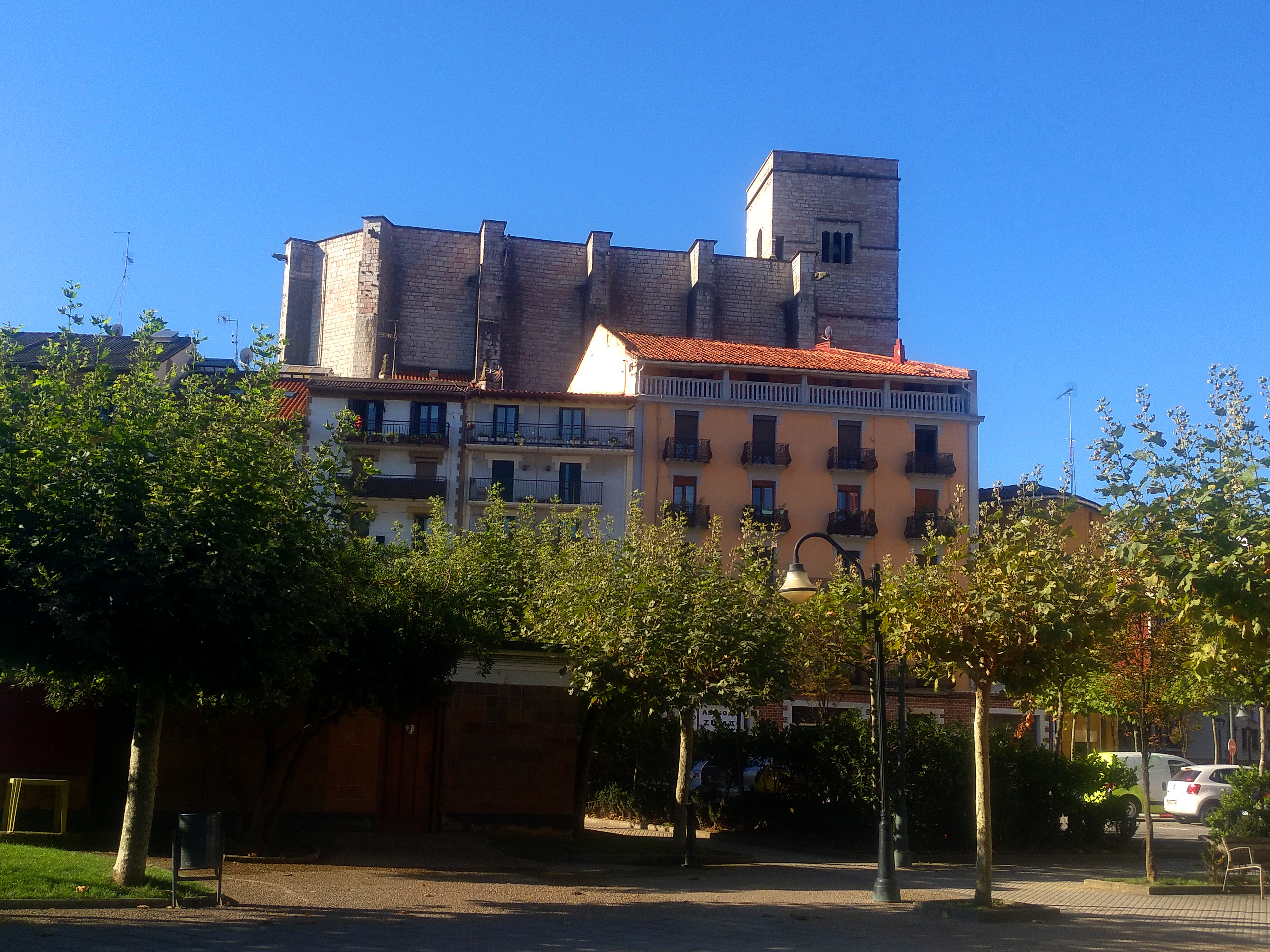 San Pedro eliza